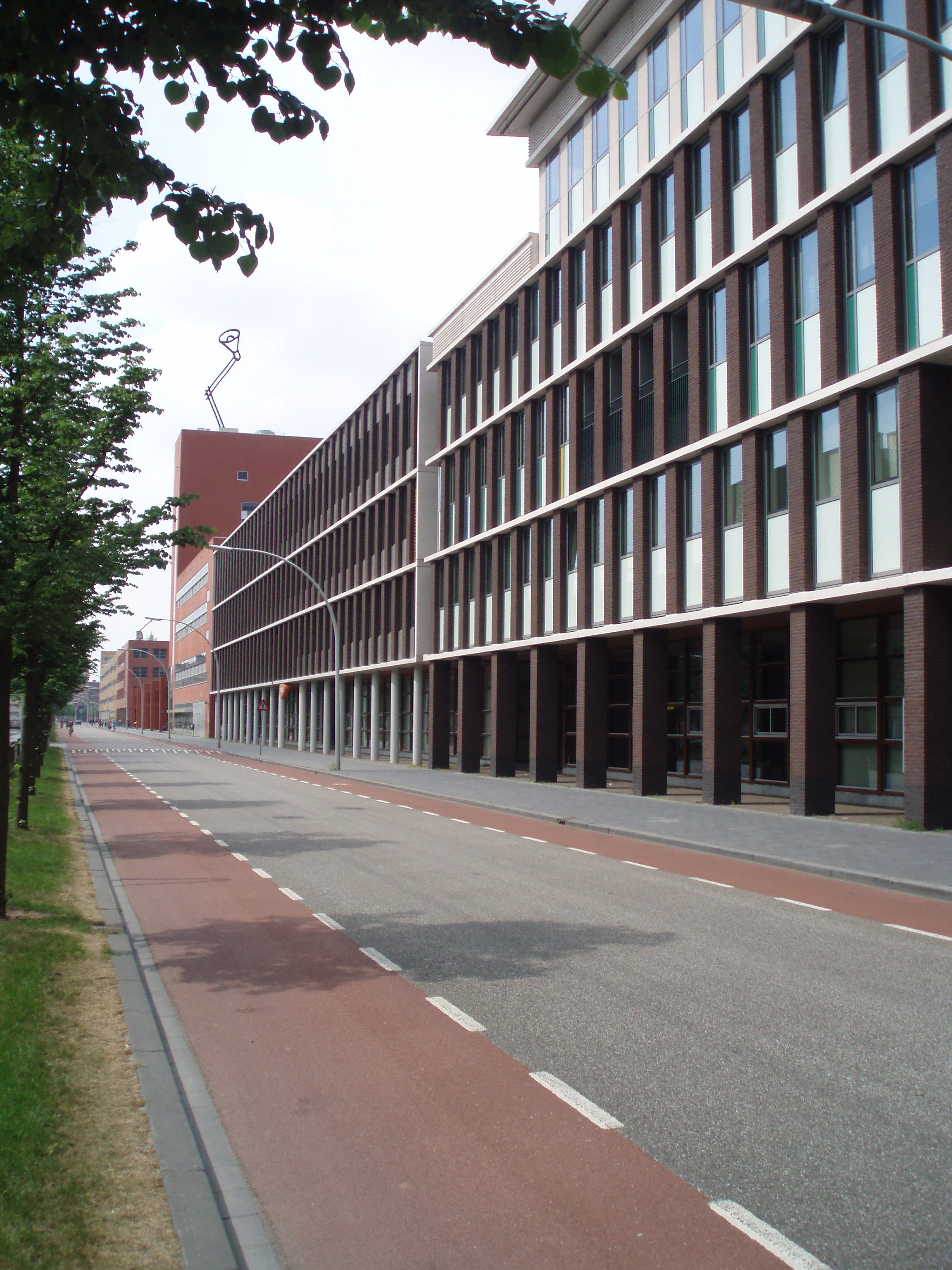 De wijk Hanzeland in Zwolle.